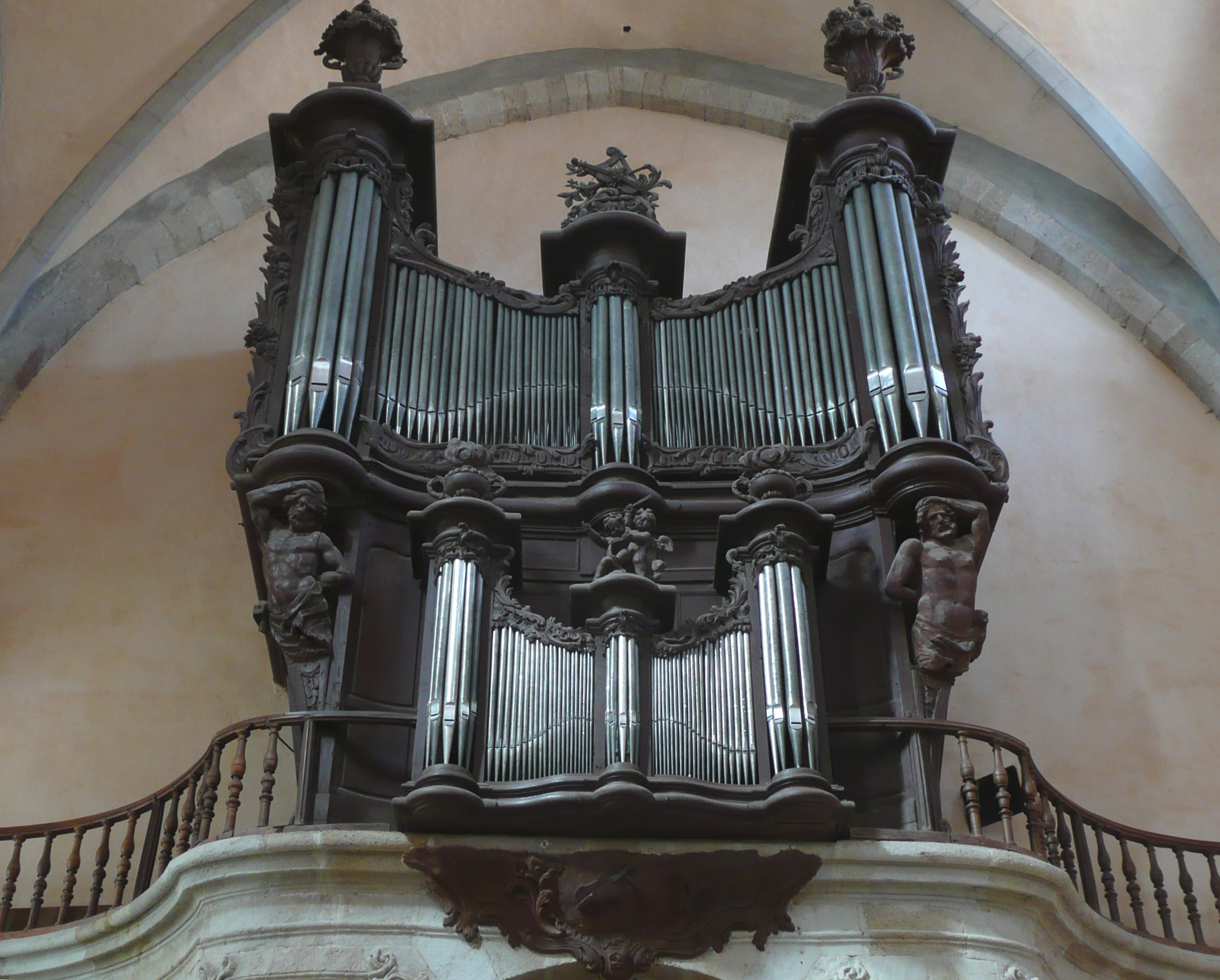 Vabres-l'Abbaye (Aveyron) - orgue construit en 1761-62 par Jean-Baptiste Micot père et fils restauré par Koenig en 1977 et plus récemment en 2004